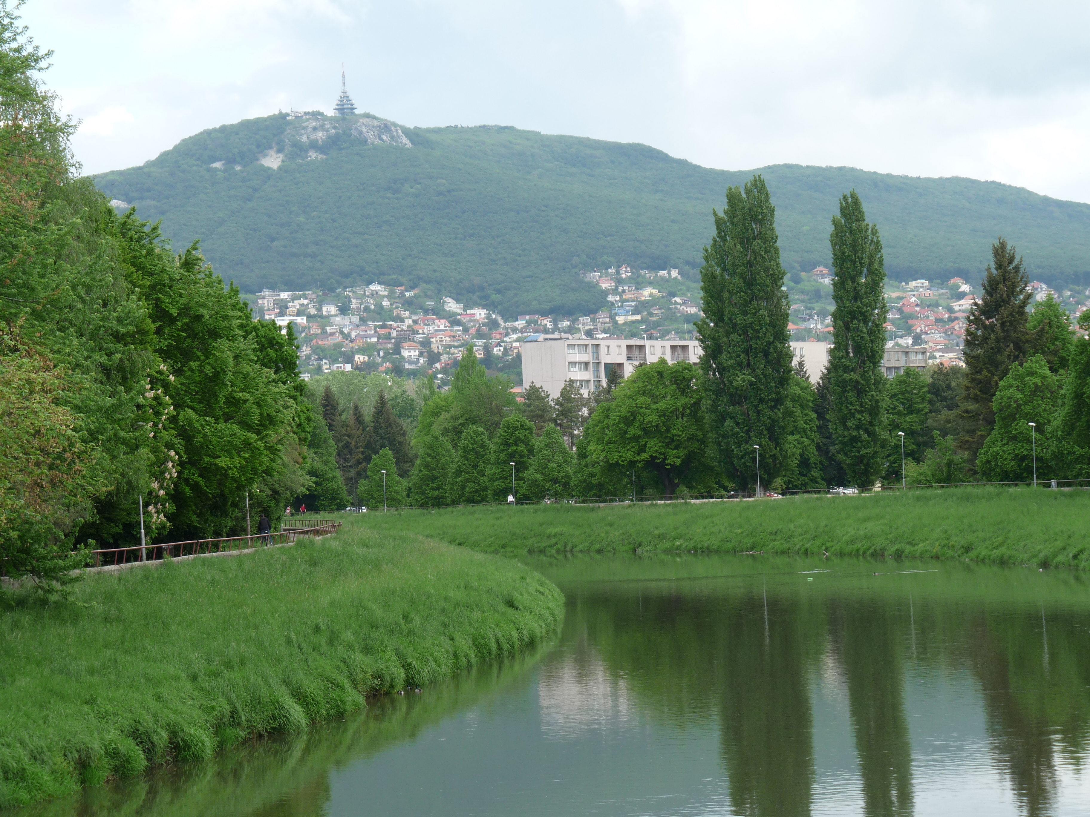 Zobor nad riekou Nitrou